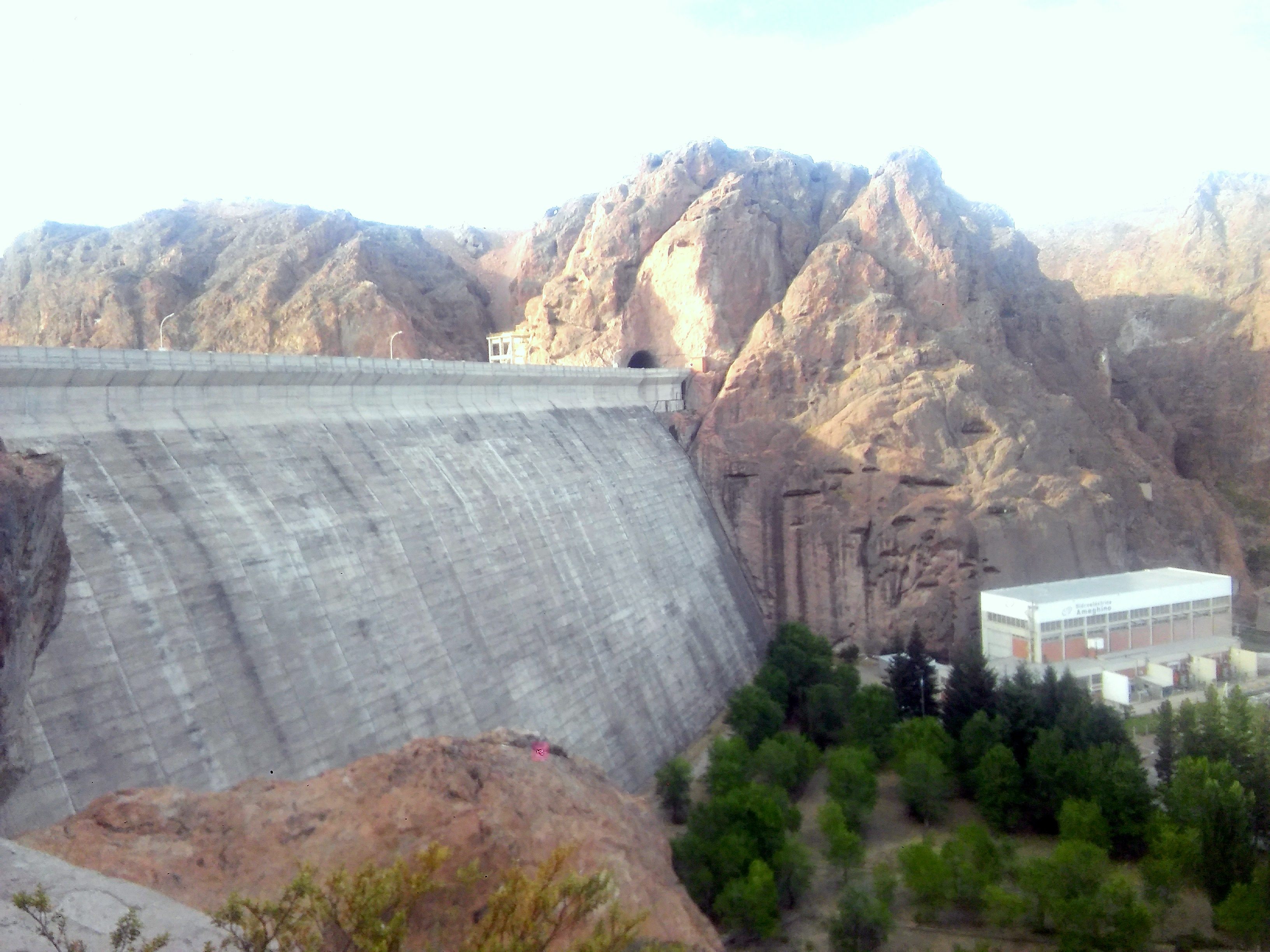 Vista del murallón del dique desde la villa